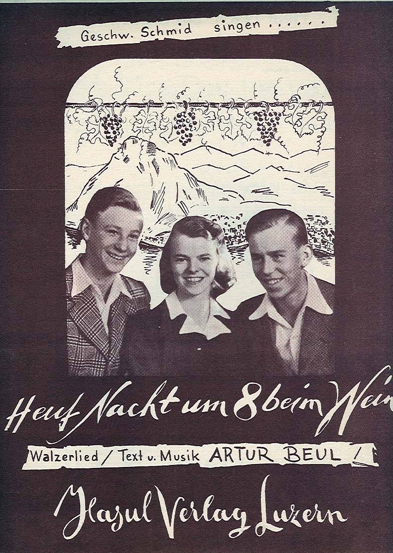 Notenblatt Heut Nacht